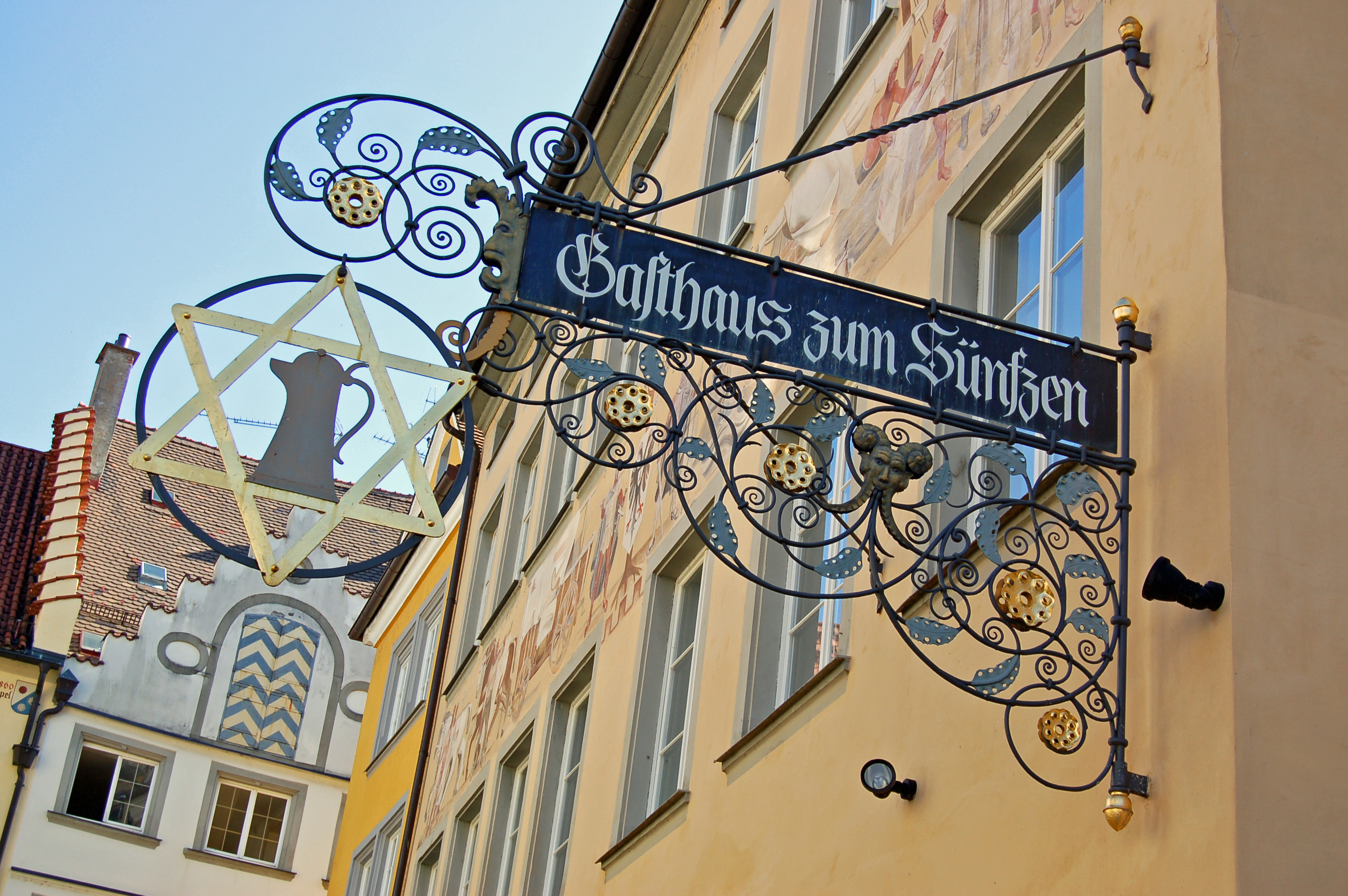 Lindau mit seinem von Löwen und Leuchtturm »bewachten« Hafen besticht mit seinen malerischen Altstadtgassen aus Gotik-, Renaissance- und Barockbauten, seinem kunstvoll bemalten Rathaus und seinen bodenständigen Gasthäusern. Seit 1976 steht die gesamte Inselstadt unter Denkmalschutz. - Fast in allen Städten hier im süddeutschen Raum stößt man bei Gasthäusern auf diese schmiedeeisernen Gasthausschilder.